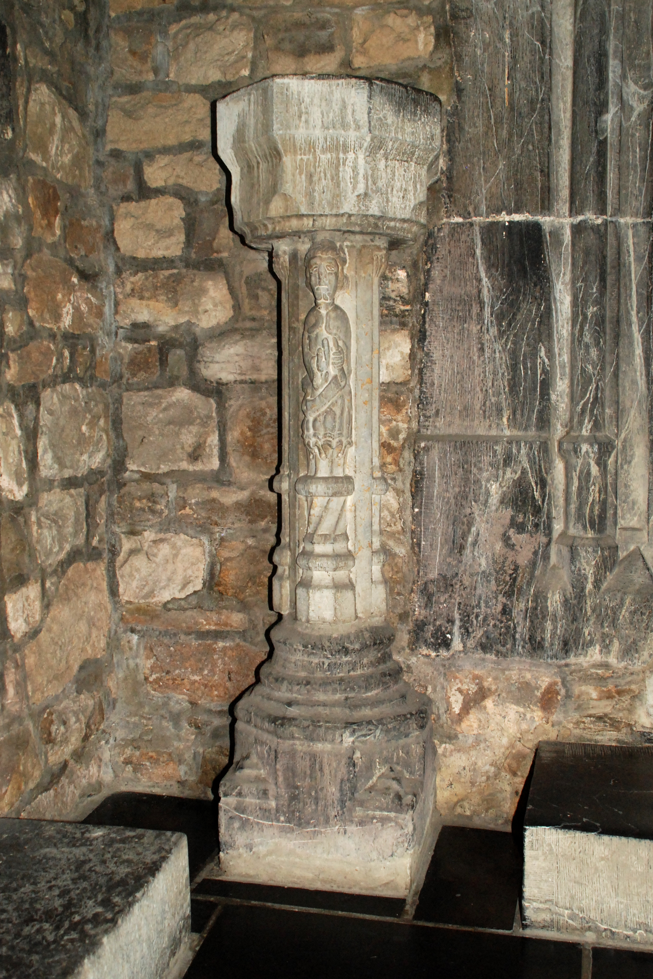 Belgique - Wallonie - Église Saints-Hermès-et-Alexandre de Theux